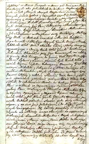 Akt darowizny nieruchomości ziemskiej dokonany przez właściciela majątku Małaszewicze Małe, wywodzącego się z tatarskiej rodziny porucznika Abrahama Koryckiego z 7 IX 1811 roku - strona 2